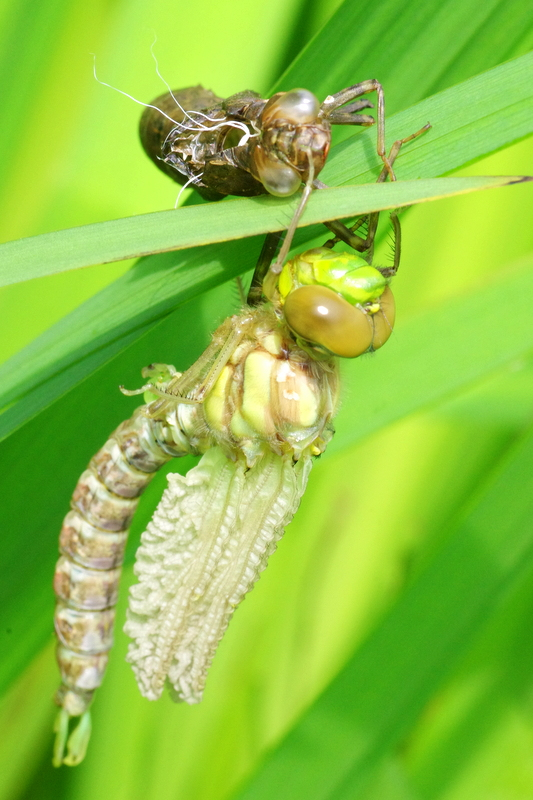 Żagnica sina (Aeshna cyanea) - przeobrażenie. Ważka chwyta odnóżami oskórek larwy (wylinkę). Oddycha już powietrzem atmosferycznym, przez umieszczone po obu stronach każdego segmentu ciała przetchlinki